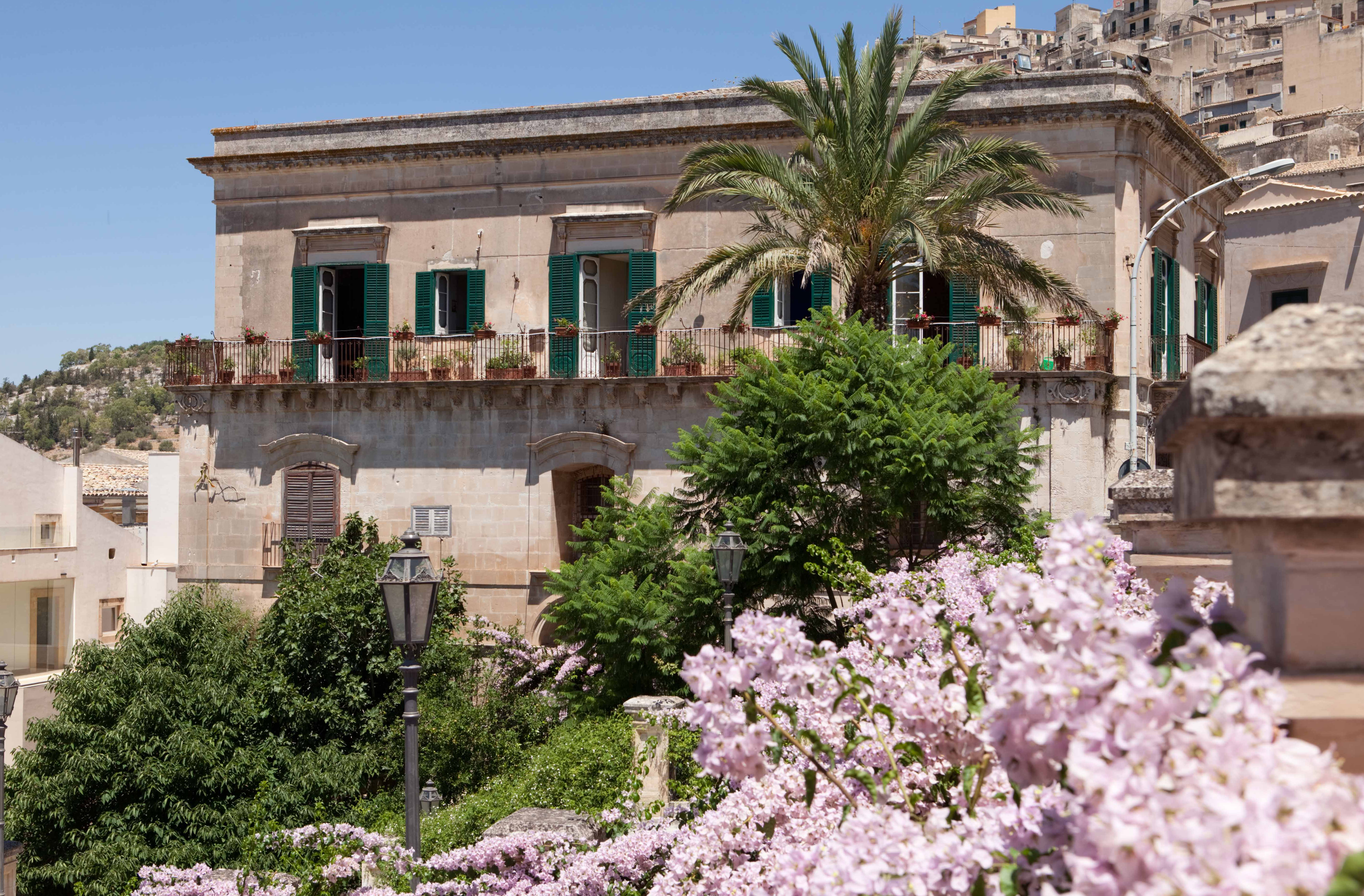 Facciata esterna, scalinata di San Giorgio